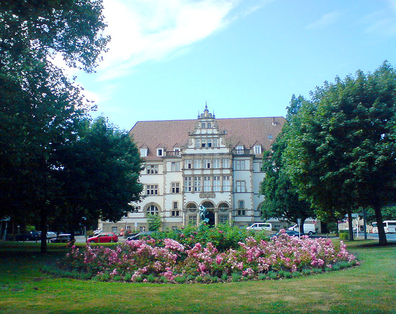 Regierungsgebäude der Bezirkgsregíerung in Minden (erbaut 1906), Kreis Minden-Lübbecke, Nordrhein-Westfalen.